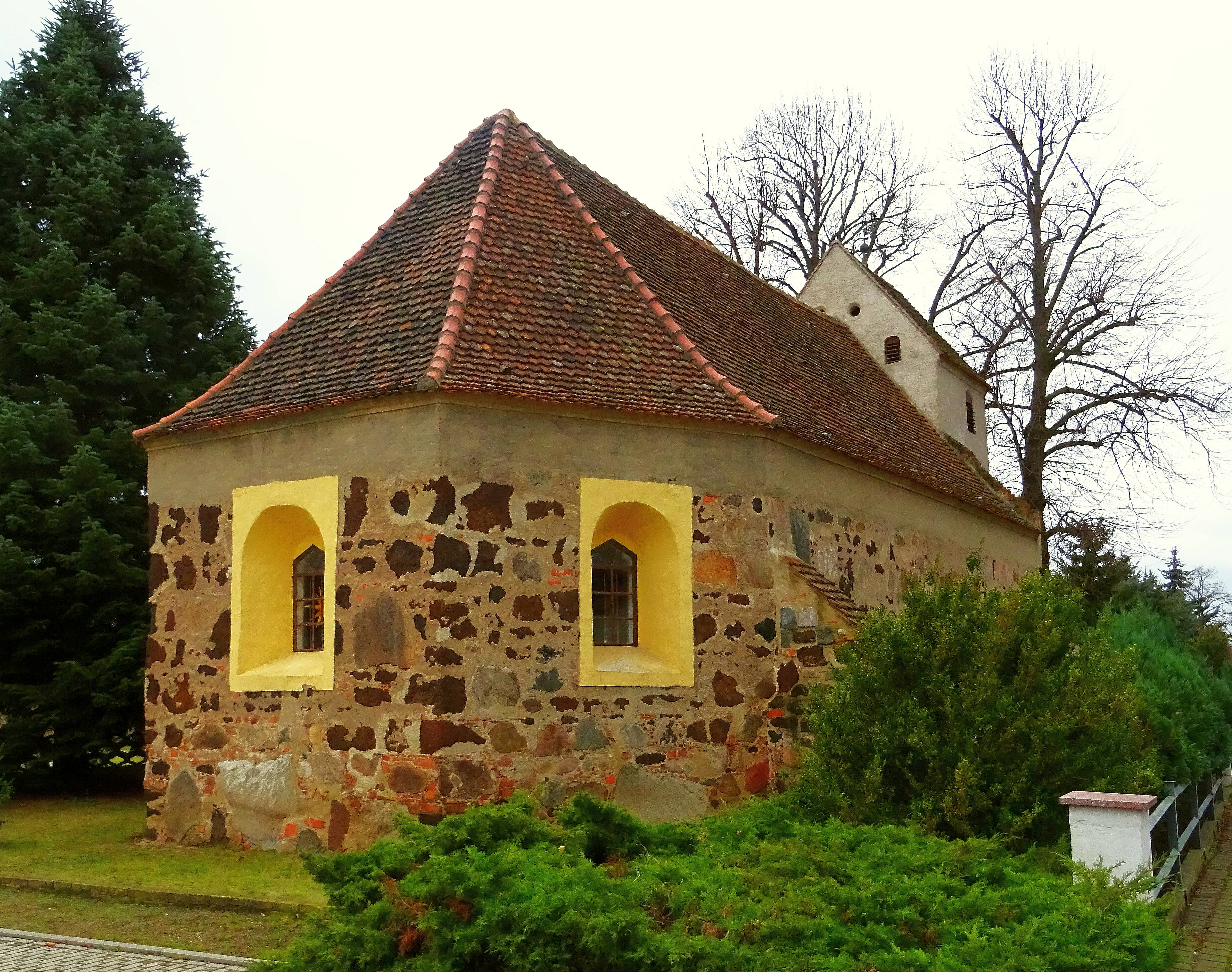 Kirche in Schilda (Church of Schilda)